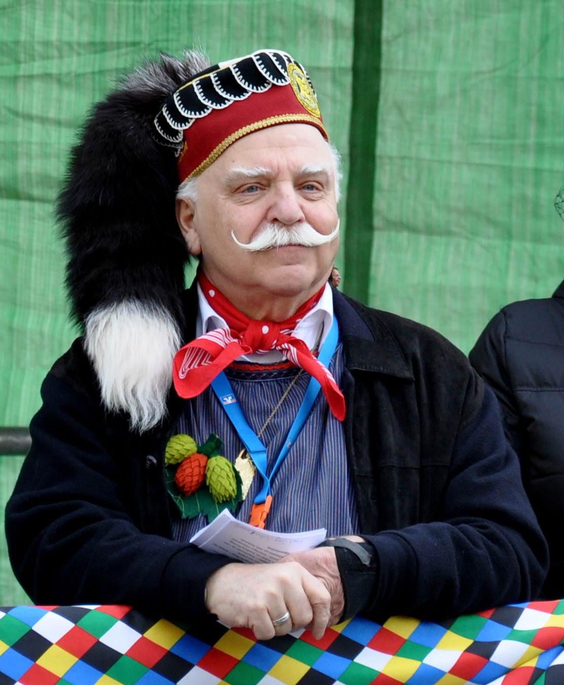 Jürgen Hohl als Moderator des Weckens des Hopfennarren auf dem Montfortplatz Fotografiert beim Landschaftstreffen der Vereinigung Schwäbisch-Alemannischer Narrenzünfte (VSAN) 2014 in Tettnang; Samstag, 15. Februar 2014